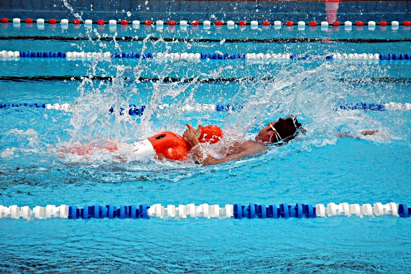 Rettungsschwimmen:Die Disziplin Puppe schleppen bei Wettkämpfen im Rettungsschwimmen. Aufgenommen beim 11. Internationalen Bodenseepokal 2004 der DLRG in Müllheim. (Original text : Die Disziplin Puppe schleppen bei Wettkämpfen im Rettungsschwimmen) Kamera: Nikon D70 Software: GIMP Andere Versionen